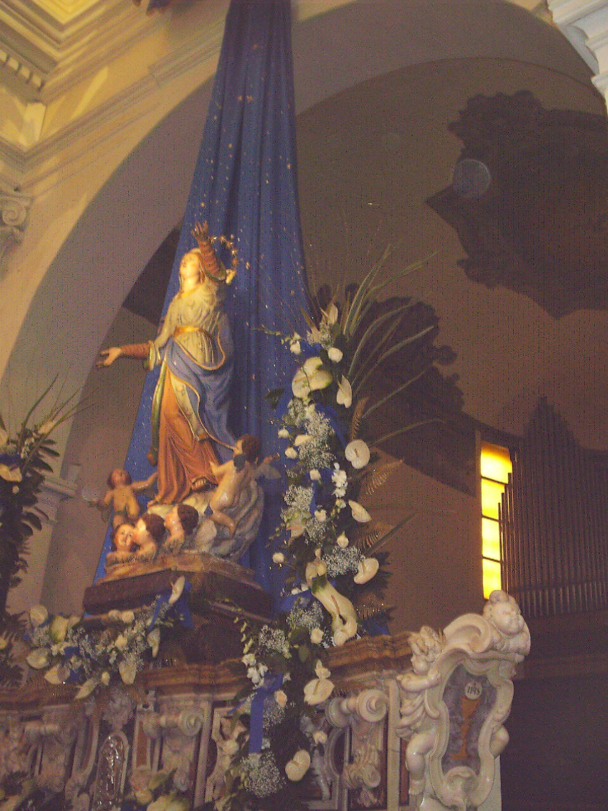 statua dell'assunta nella chiesa della Madonna della Valle